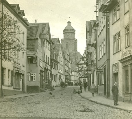 Westheimer Str.